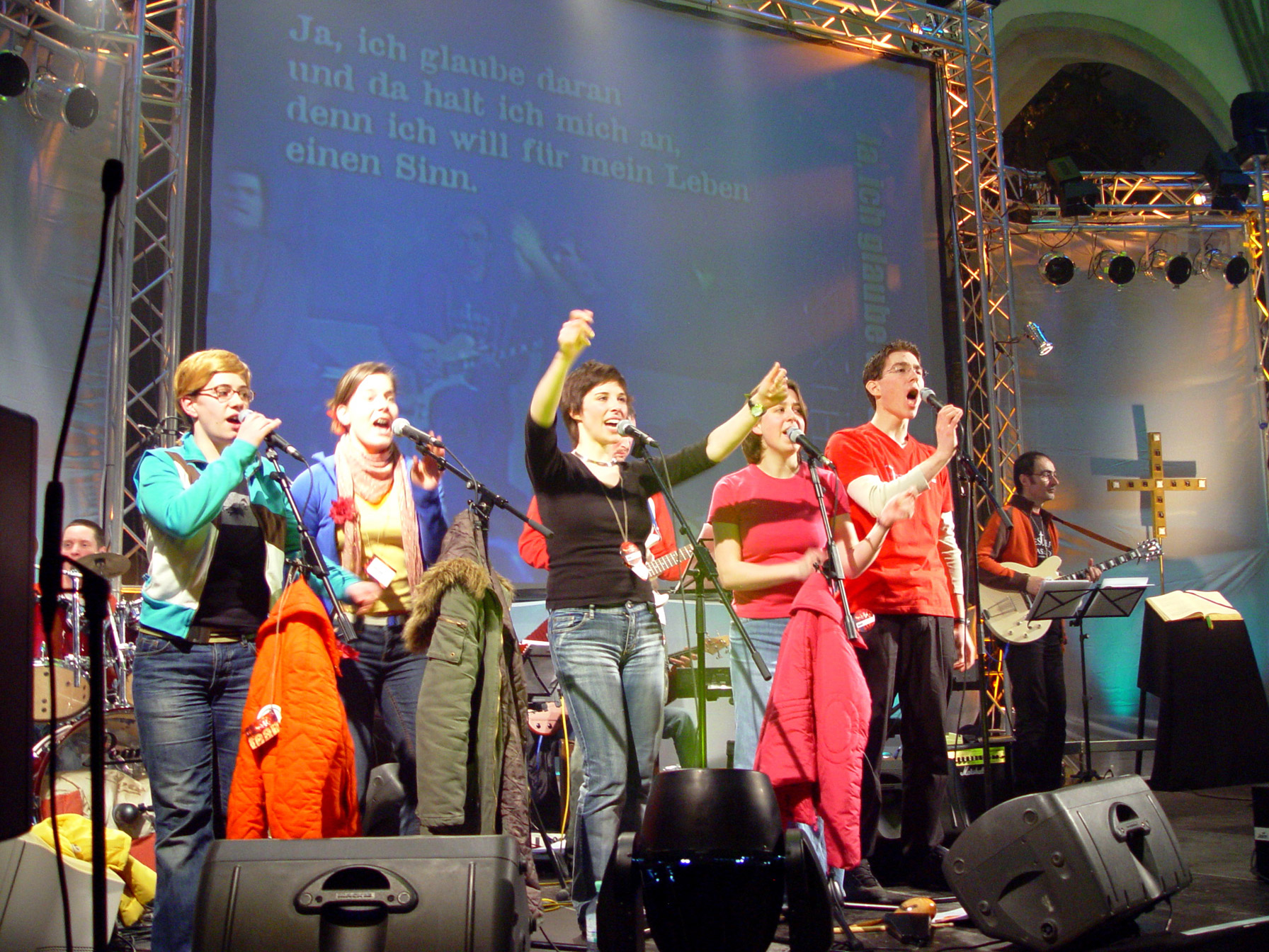 Rockband beim find•fight•follow-Gottesdienst "sinnlos? sinn-los!" am 13. März 2005 in Korneuburg (Niederösterreich).